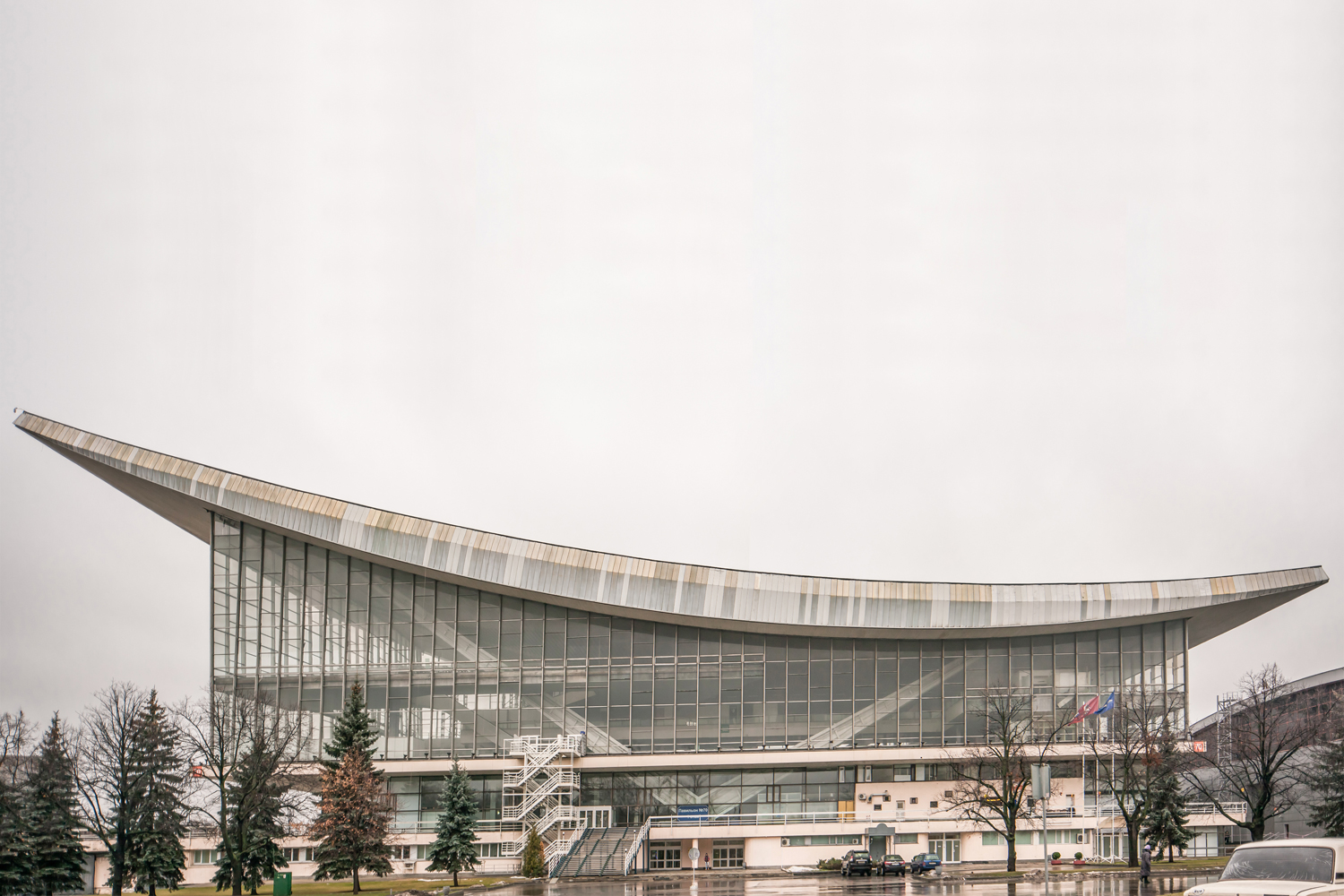 Монреальский павильон ВДНХ